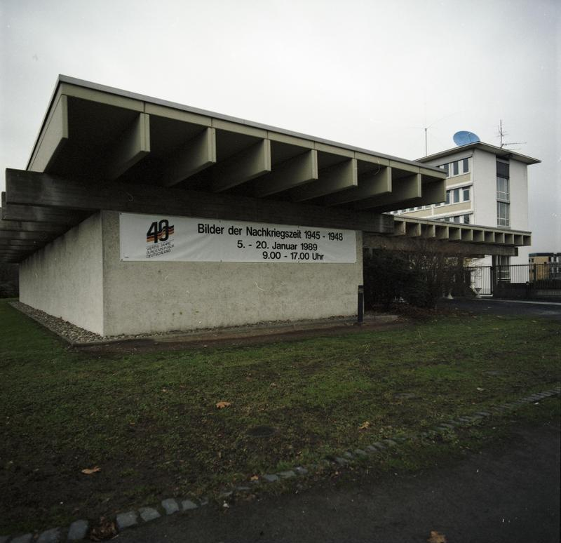 9.1.1989 Foto-Ausstellung "Bilder der Nachkriegszeit 1945-1948" der Bundesbildstelle im Bundespresseamt-Pavillon